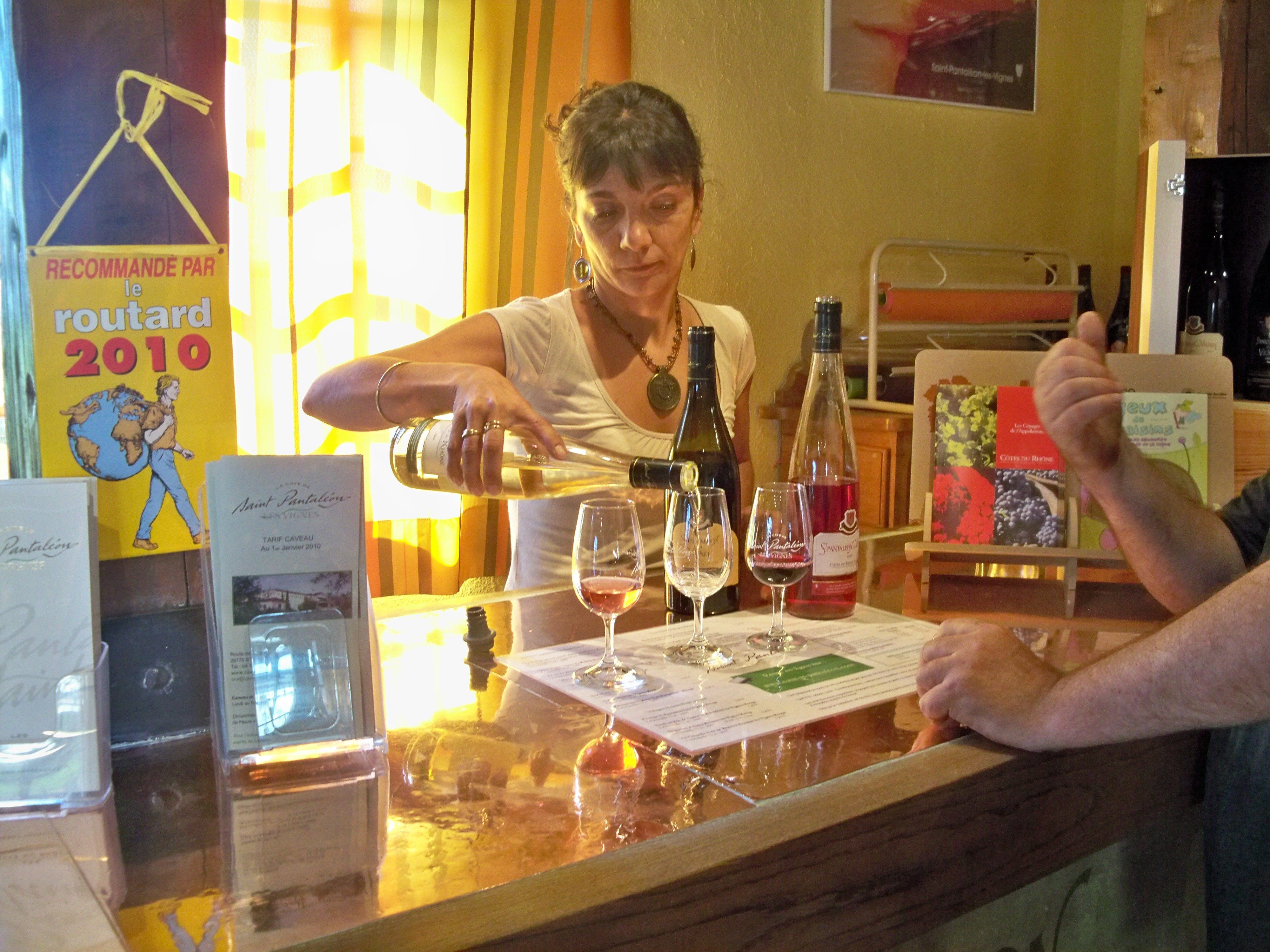 Dégustation à la cave de Saint Pantaléon, Drôme, France